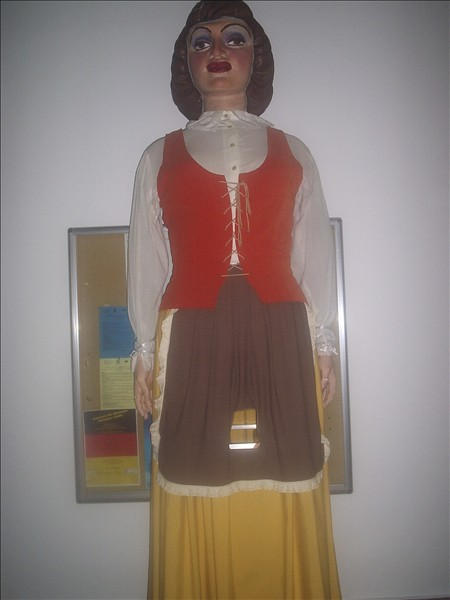 Gigantes de Alcalá de Henares